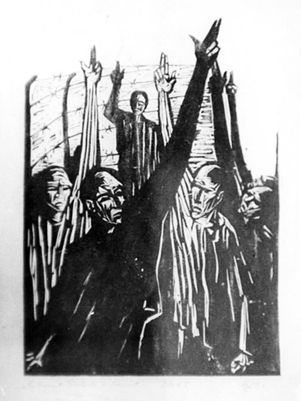 Zentralbild Krüger He-Qu 22.6.1960 10. Parteitag der CDU in Erfurt (22. bis 25.6.60) Am 22.6.1960 wurde in der Erfurther Thüringenhalle der 10. Parteitag der Christlich-Demokratischen Union unter der Losung "Christliche Demokraten: Kämpft für den Frieden auf Erden, arbeitet für den Sieg des Sozialismus, stärkt die Einheit aller demokratischen Kräfte in der Nationalen Front!" eröffnet. Rund 1250 Delegierte und Ehrengäste nehmen am Parteitag teil. Unter den Gästen befinden sich auch zahlreiche Delegationen aus dem Ausland. UBz. Der Zyklus "Es brennt, Briderle, es brennt" von Klaus H. Zürner, Leipzig, erhielt den 1. Preis im grafischen Wettbewerb zu Ehren des 10. Parteitages der CDU.